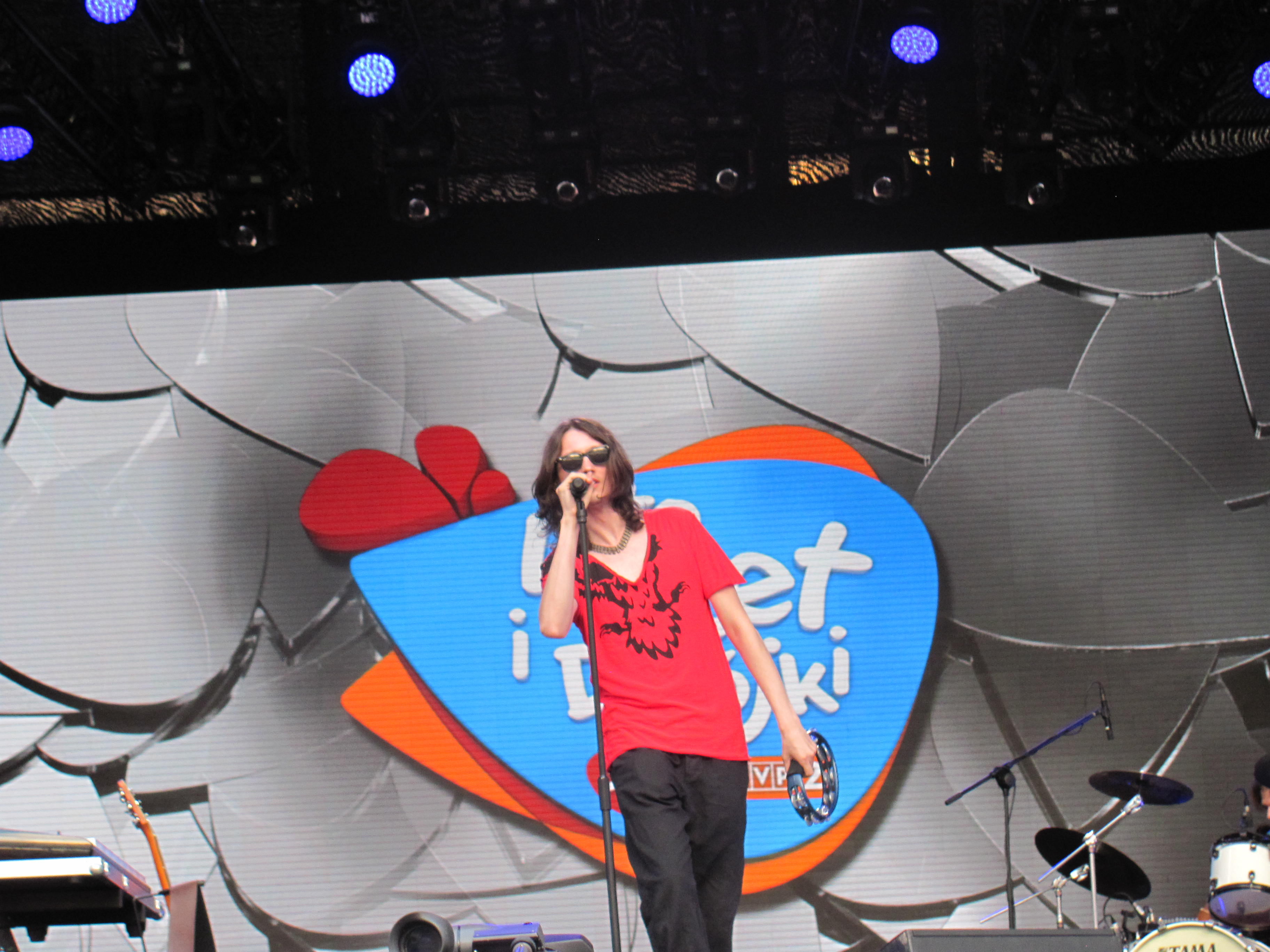 Koncert Lato Zet i Dwojki 2014 w Toruniu